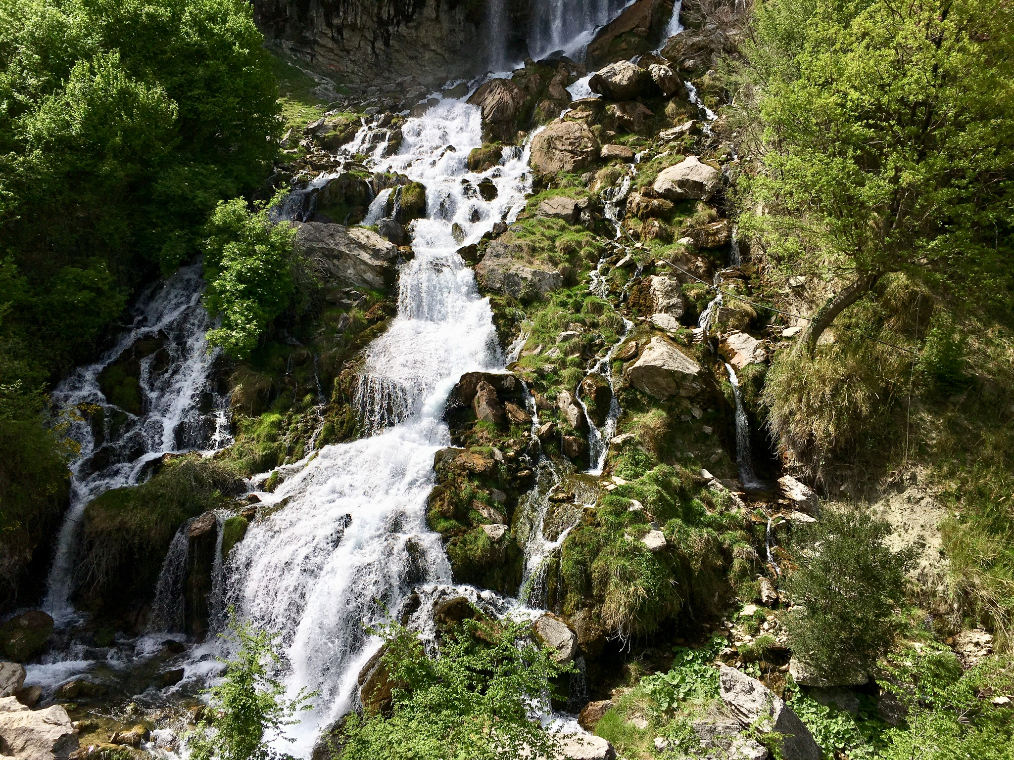 Mali i Tomorrit, Berat, Skrapar, Gramsh